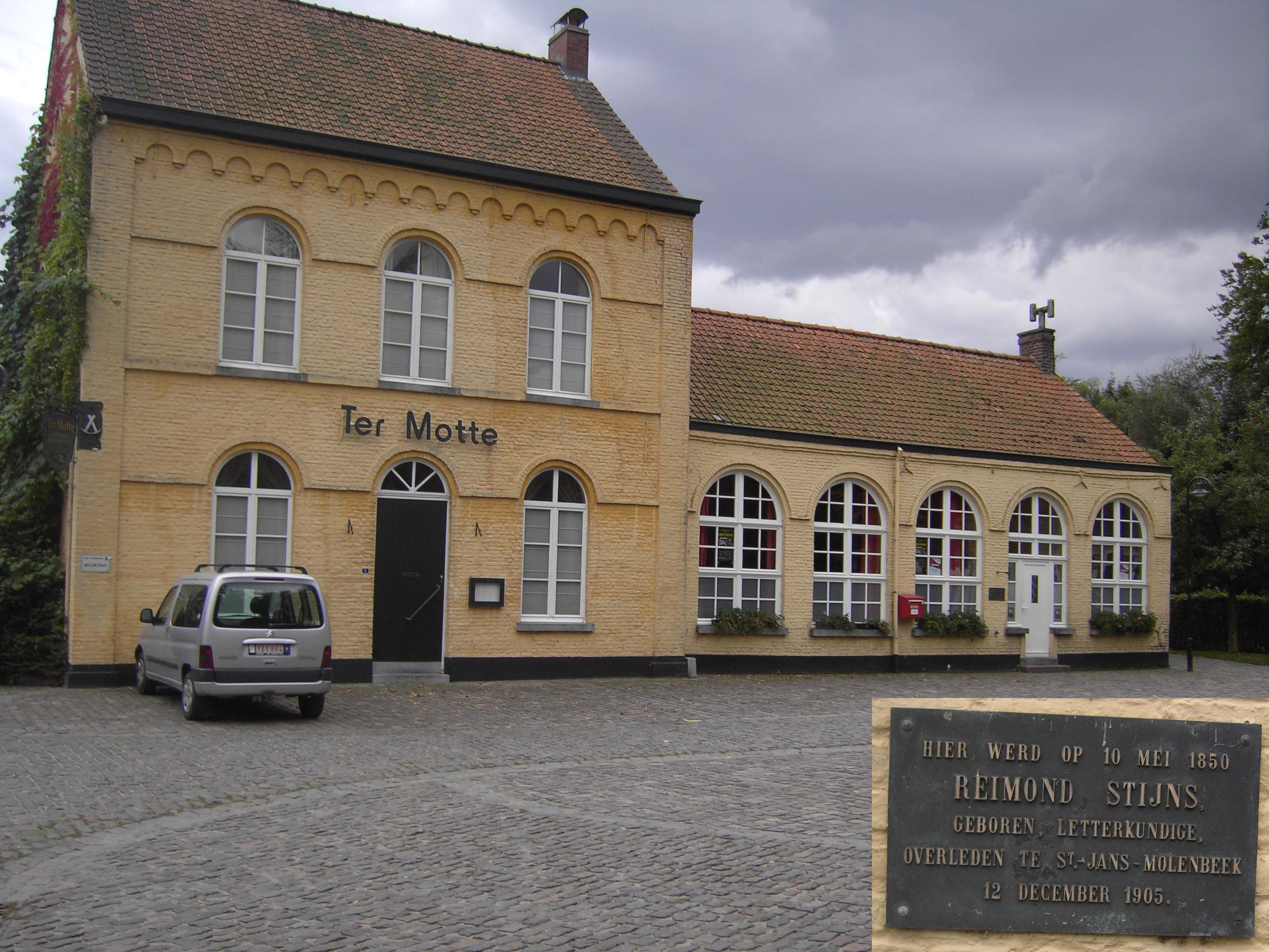 Mullem - Oudenaarde - Oost-Vlaanderen - België. Het geboortehuis van Reimond Stijns (1850-1905).